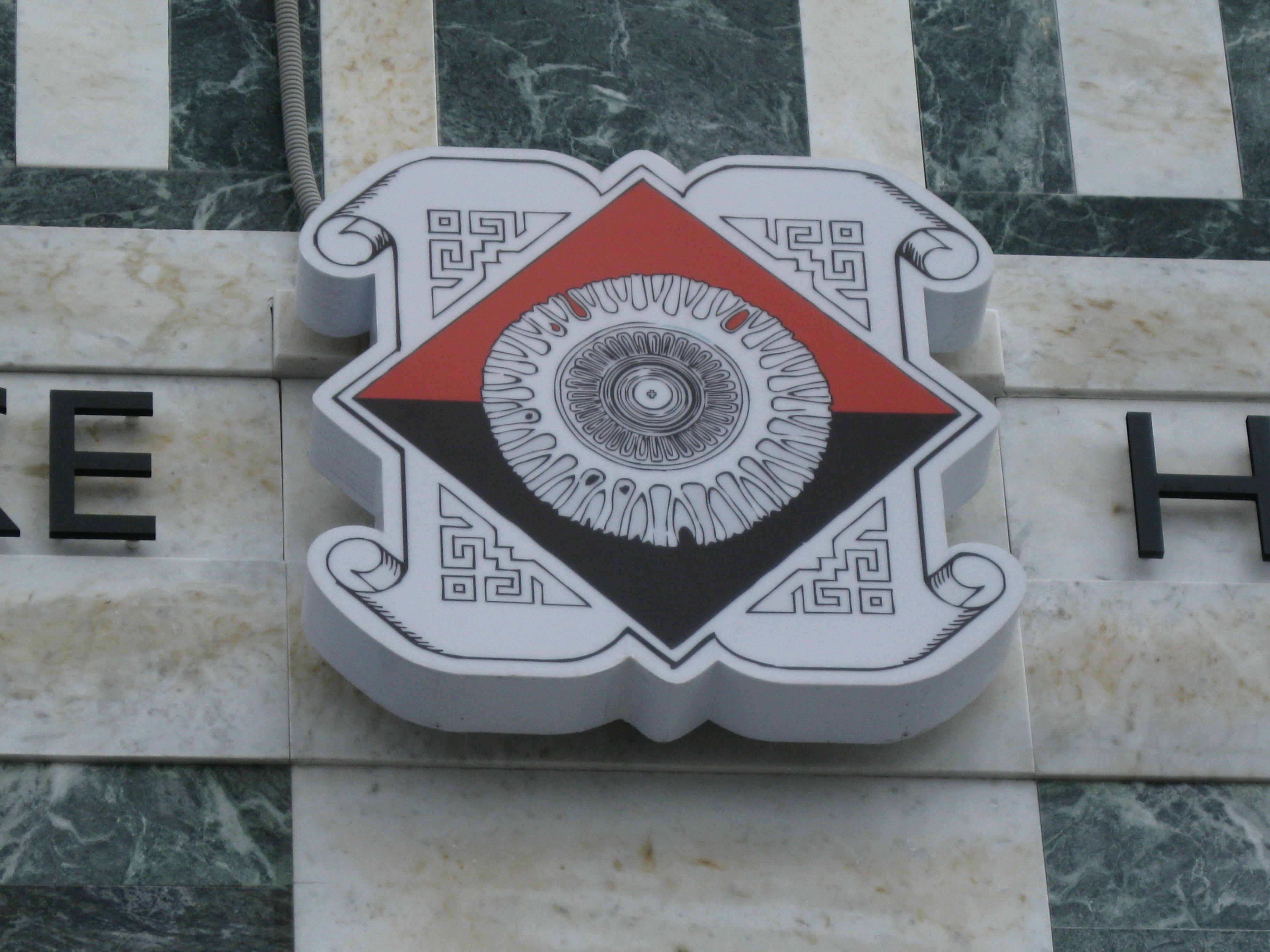 Логотип Национального музея Республики Марий Эл на фронтоне здания Музея истории и археологии, Йошкар-Ола